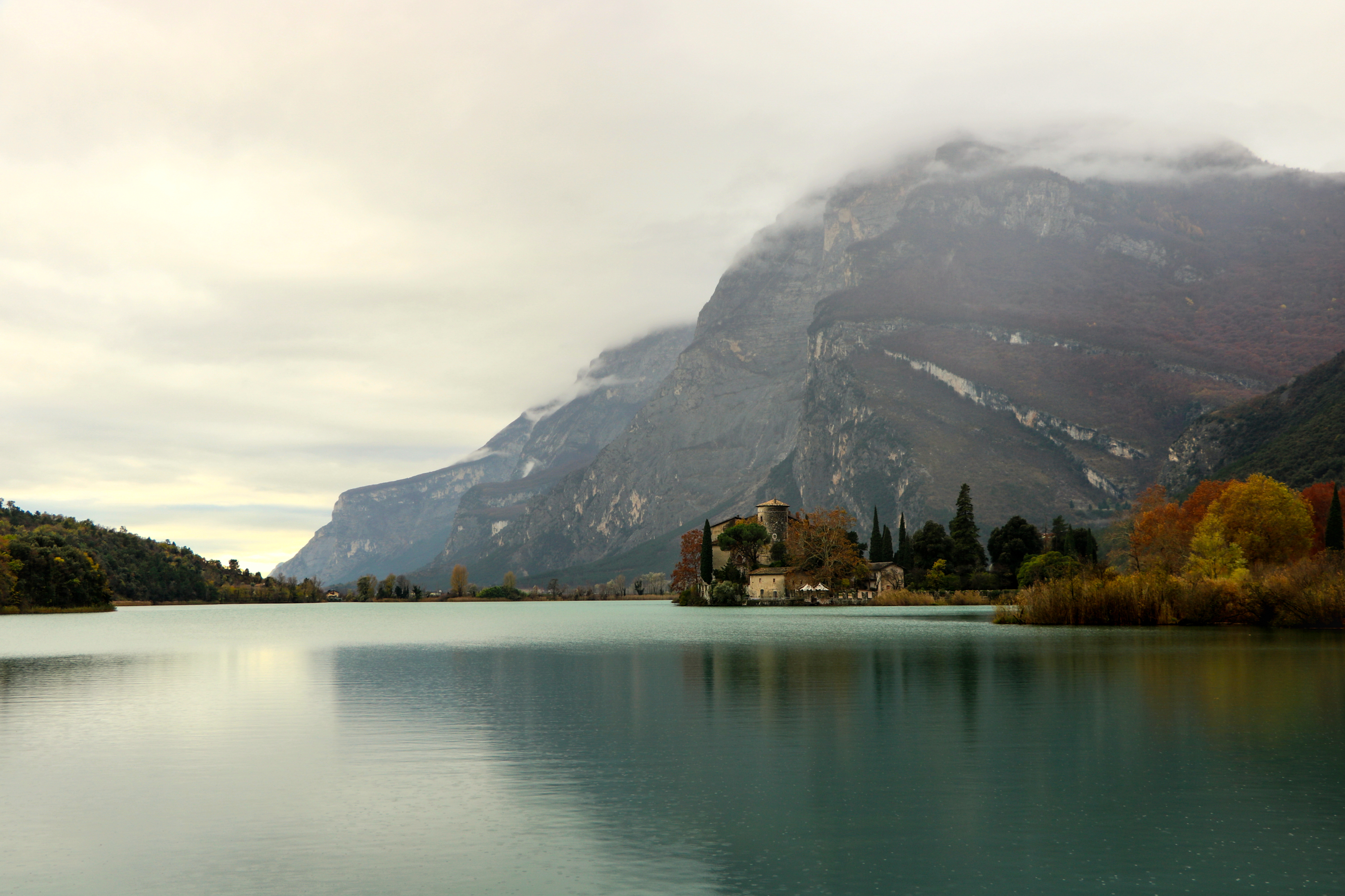 Lago di Toblino (Q47516589)